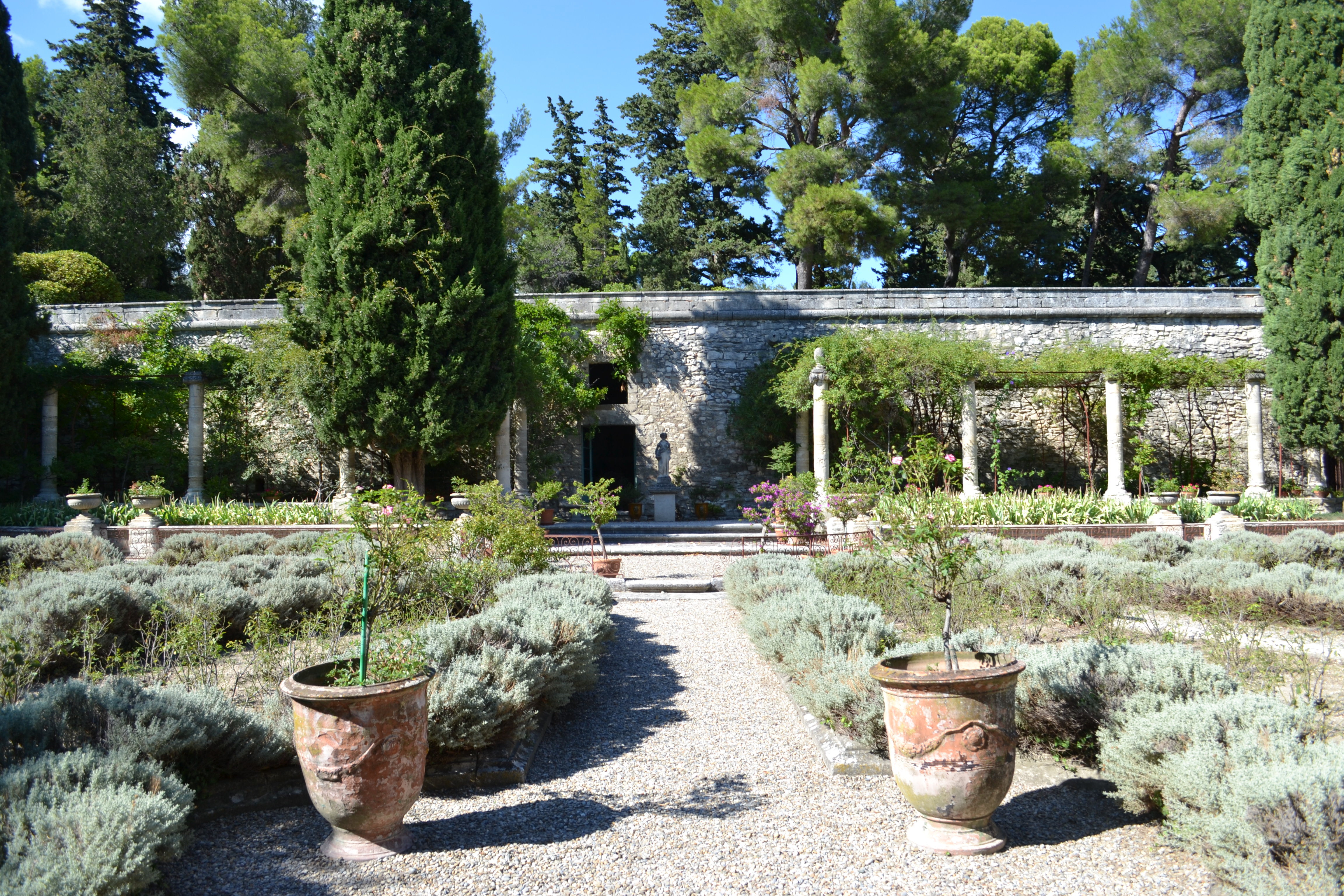 Villeneuve-lès-Avignon, France